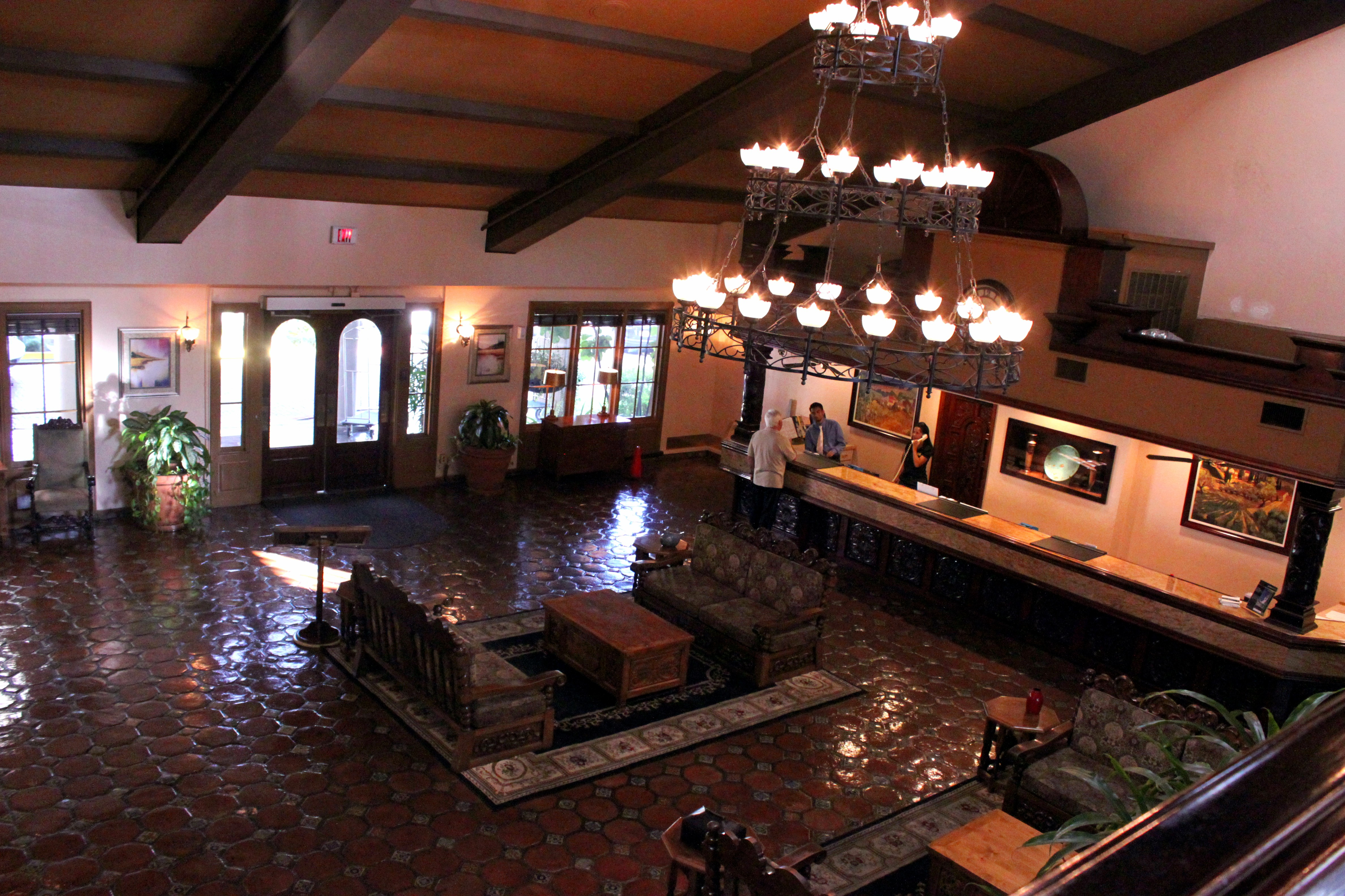 Hotel Front Desk